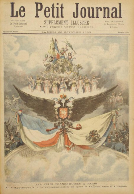 Copertina del Petit Journal che riproduce un momento dello spettacolo all'Opera di Parigi in onore dell'amicizia franco-russa (1893).